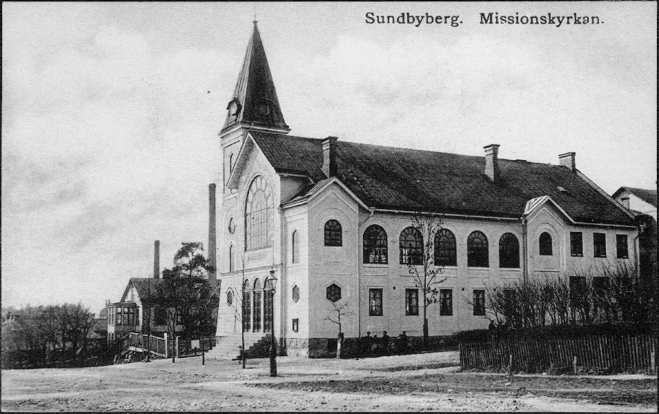 Kyrkan med omgivning. Vykort. Kategori: (01) ExteriörerKyrkan med omgivning. Vykort.